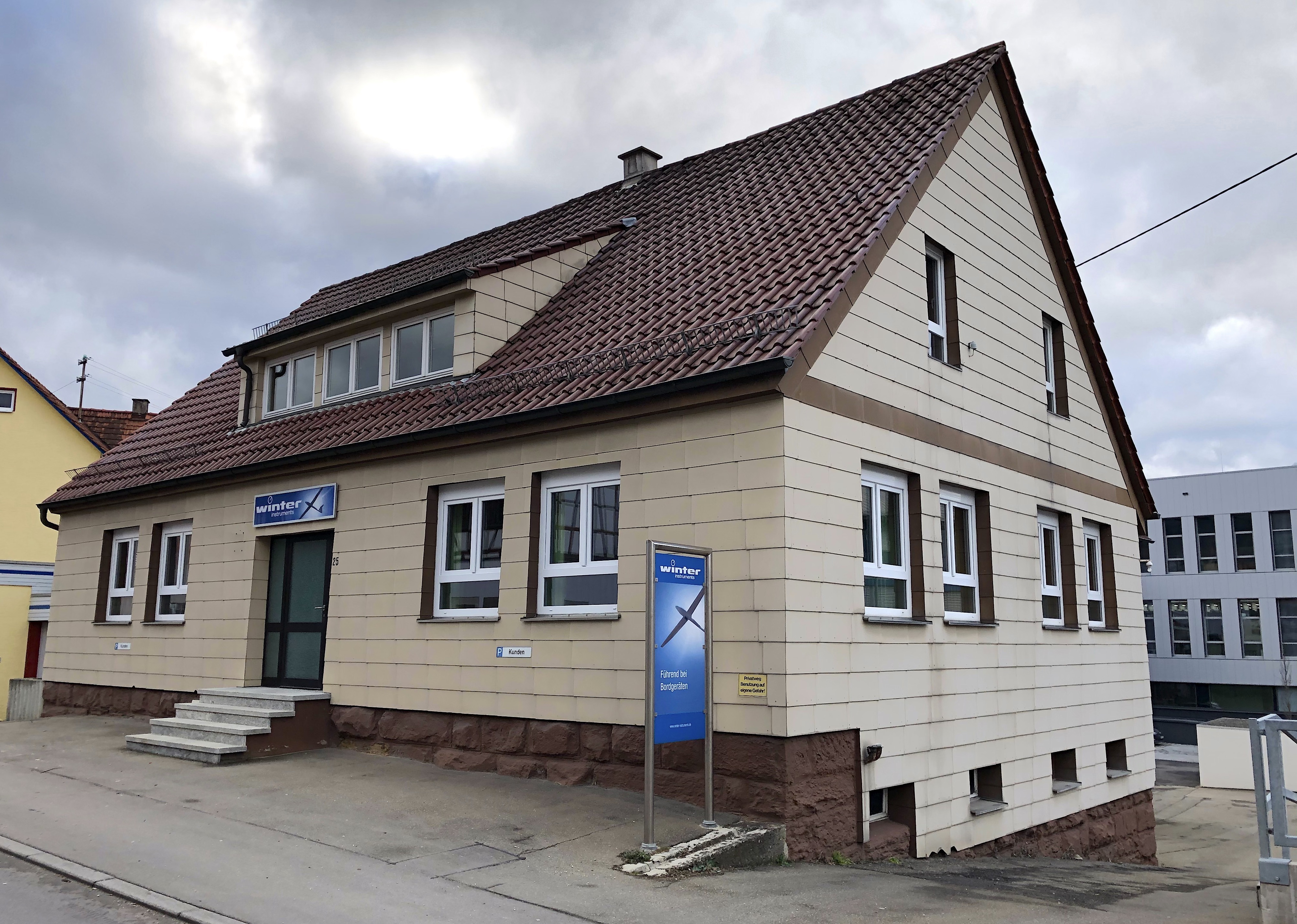 Winter instruments, Mechanische Bordgeräte, Jungingen (Zollernalbkreis)